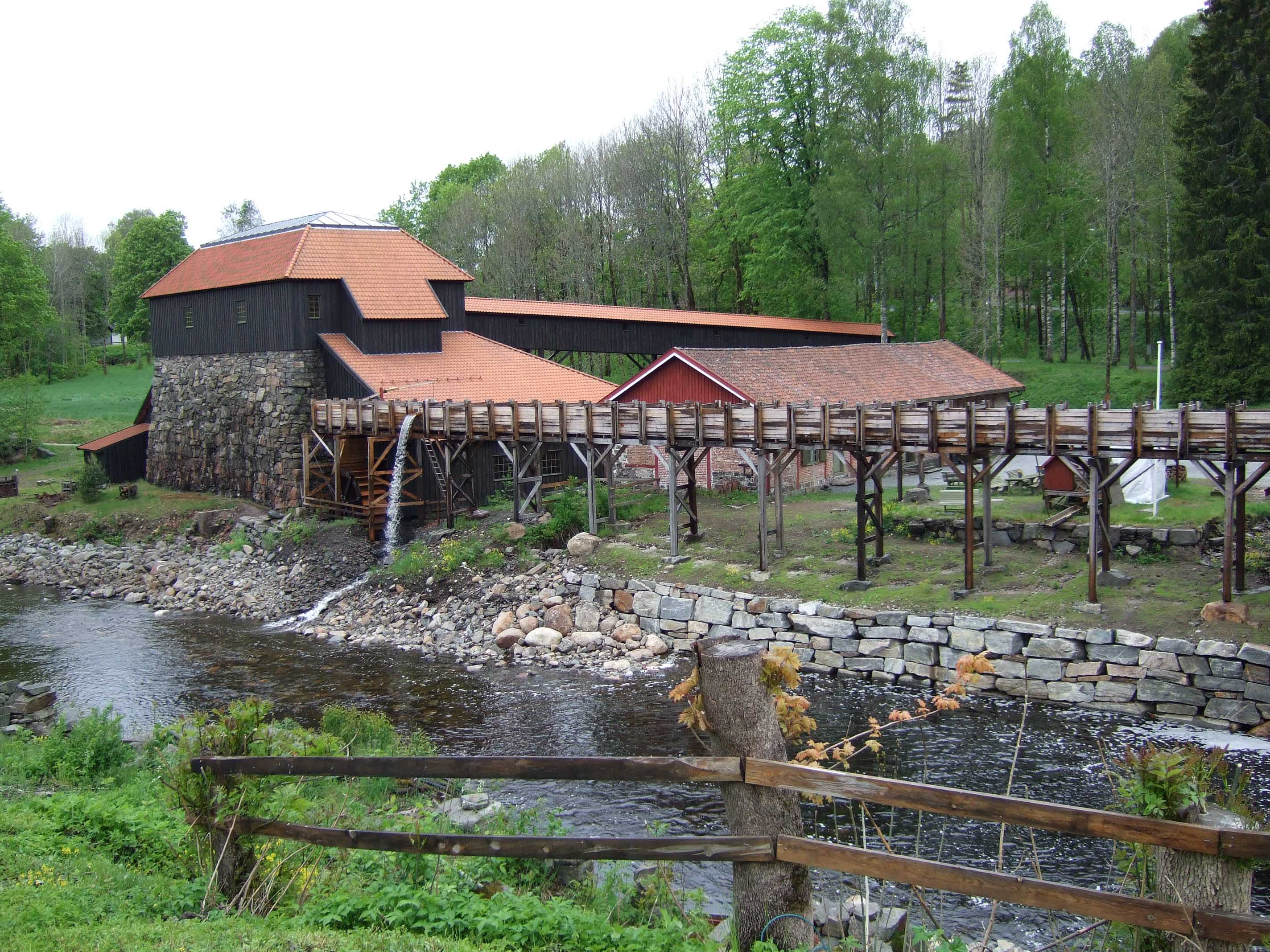 Naes Verk, Tvedestrand, Norway. Hammer house.